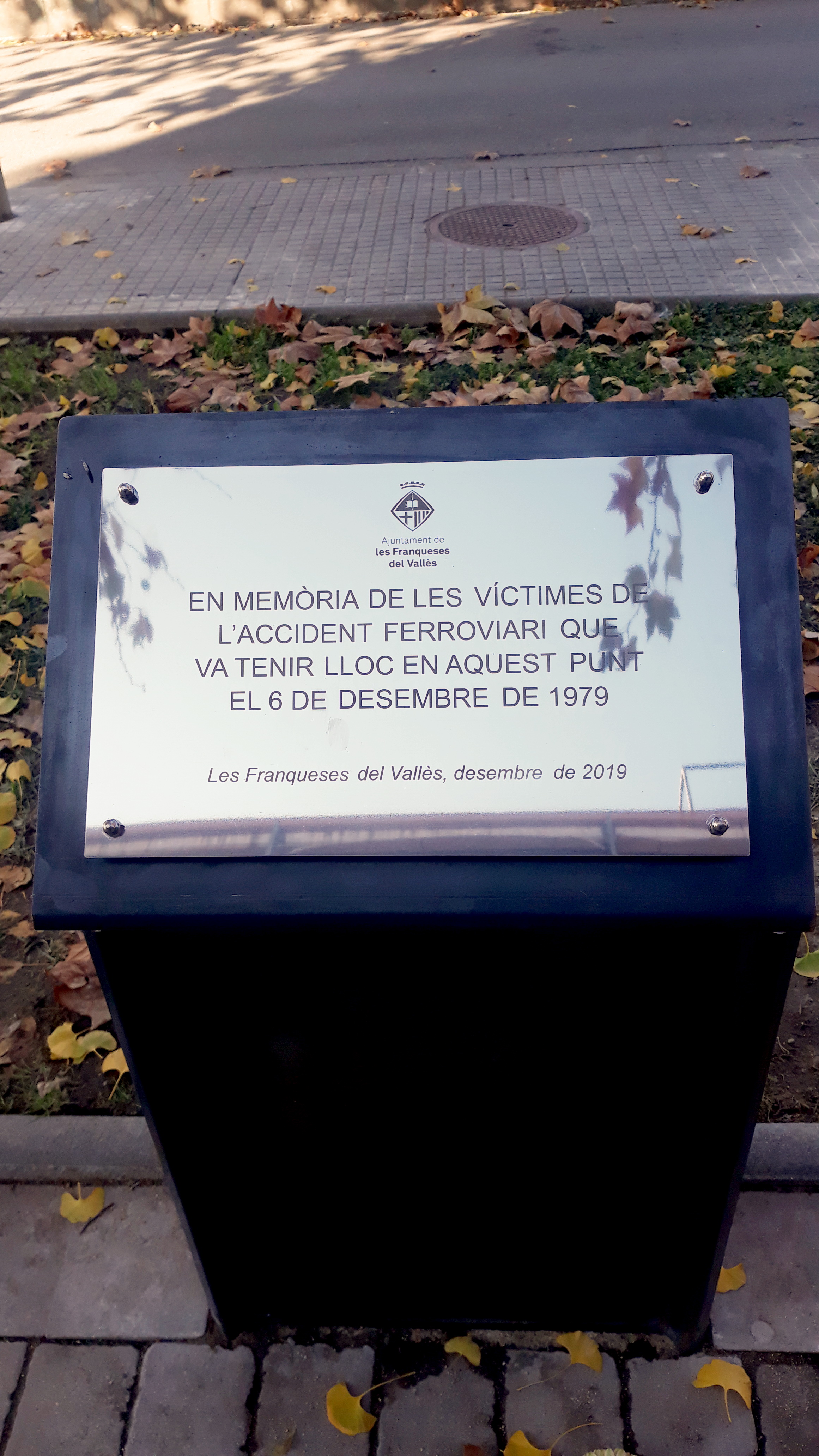 Placa commemorativa del Conmemoració 40è aniversari de l'accident de ferrocarril del 06-12-1979. Un tren desfrenat va xocar frontalment contra un altre comboi i va haver 5 morts i més de 40 ferits. 40 anys després, es va recordar amb una placa al lloc on havia succeït l'accident.